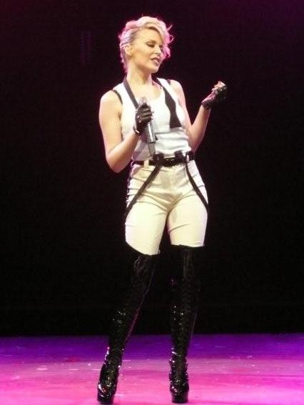 KylieX2008